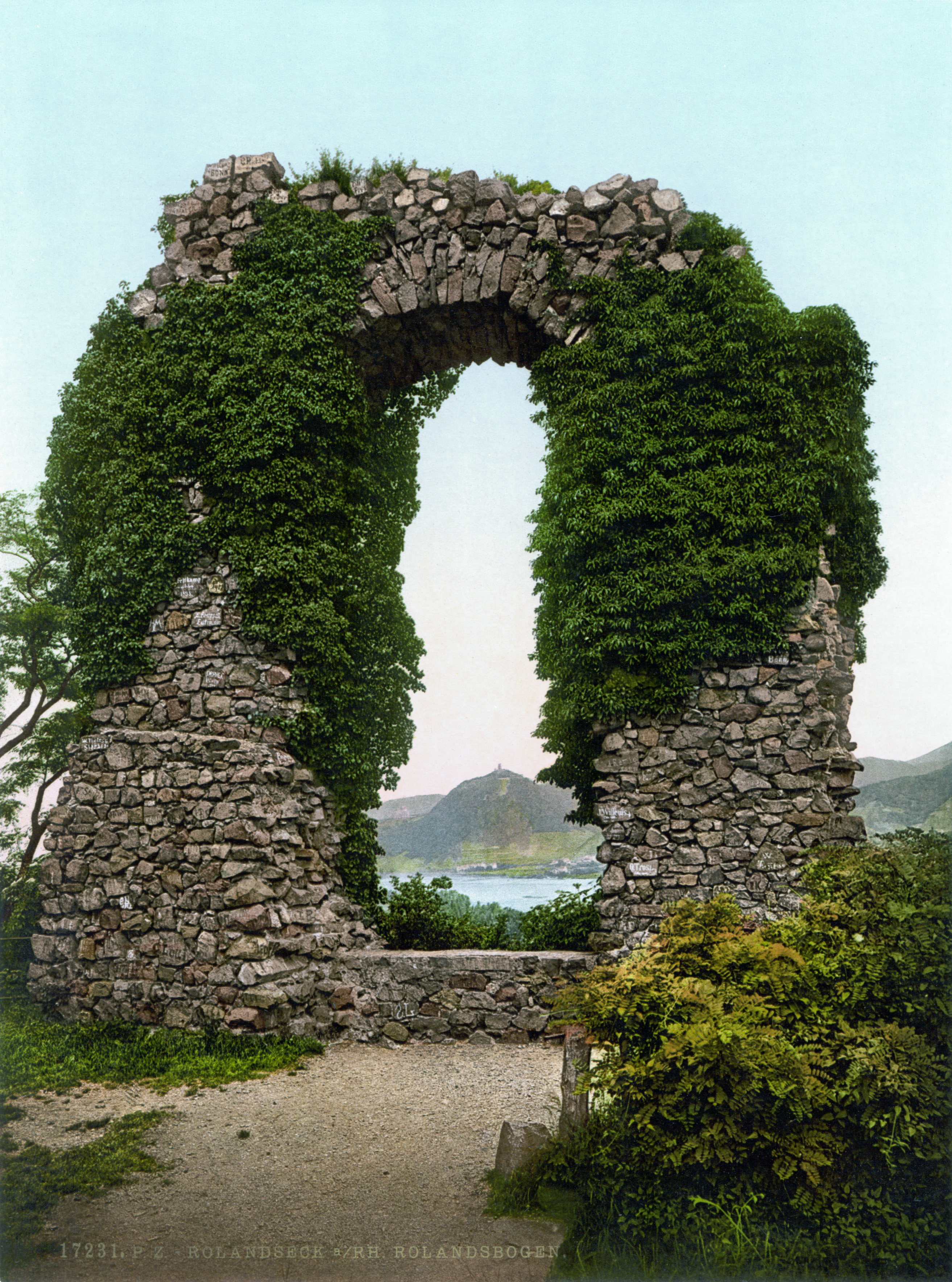 Rolandsbogen